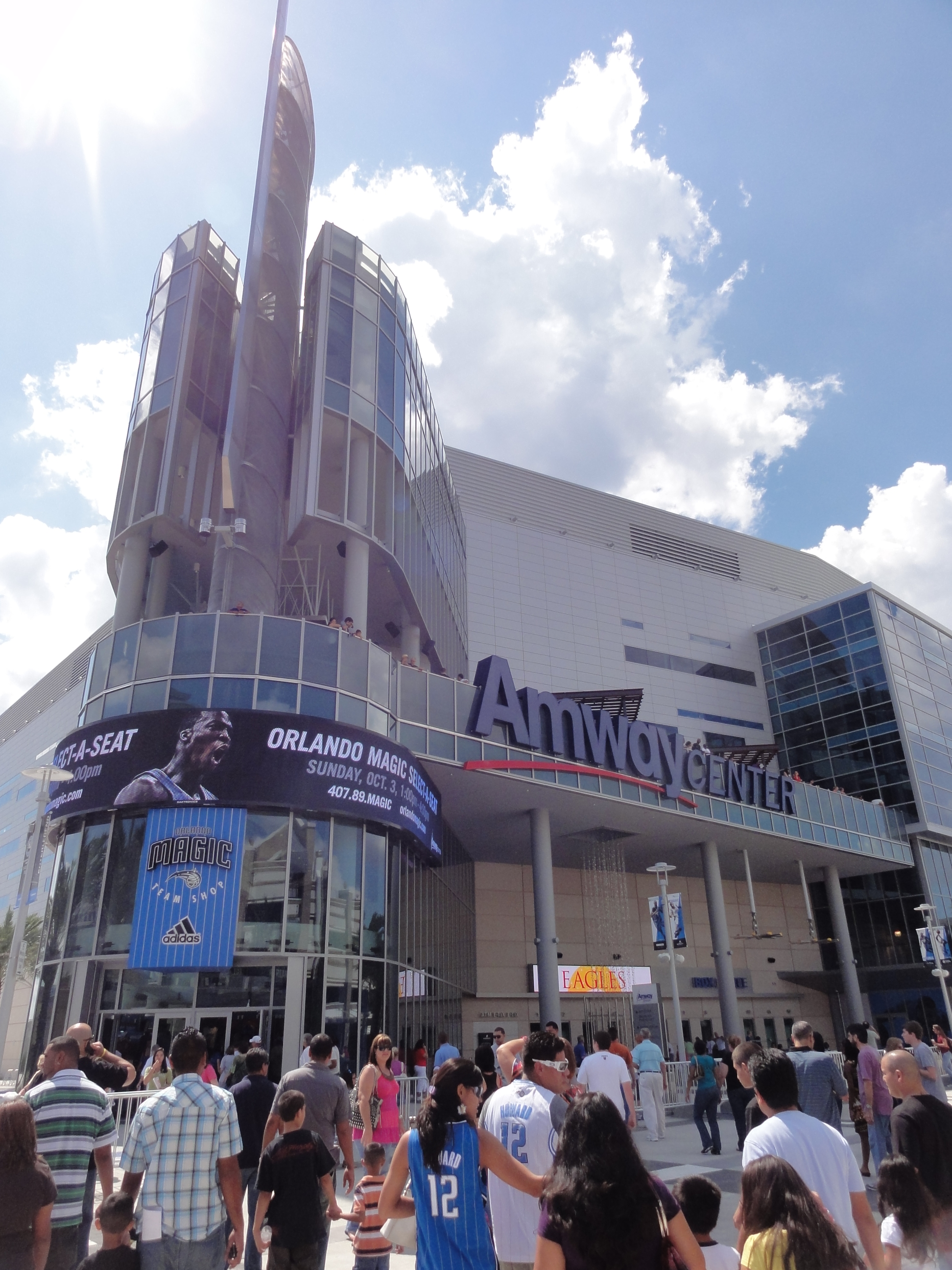 2010/10/02 at Amway CENTER.